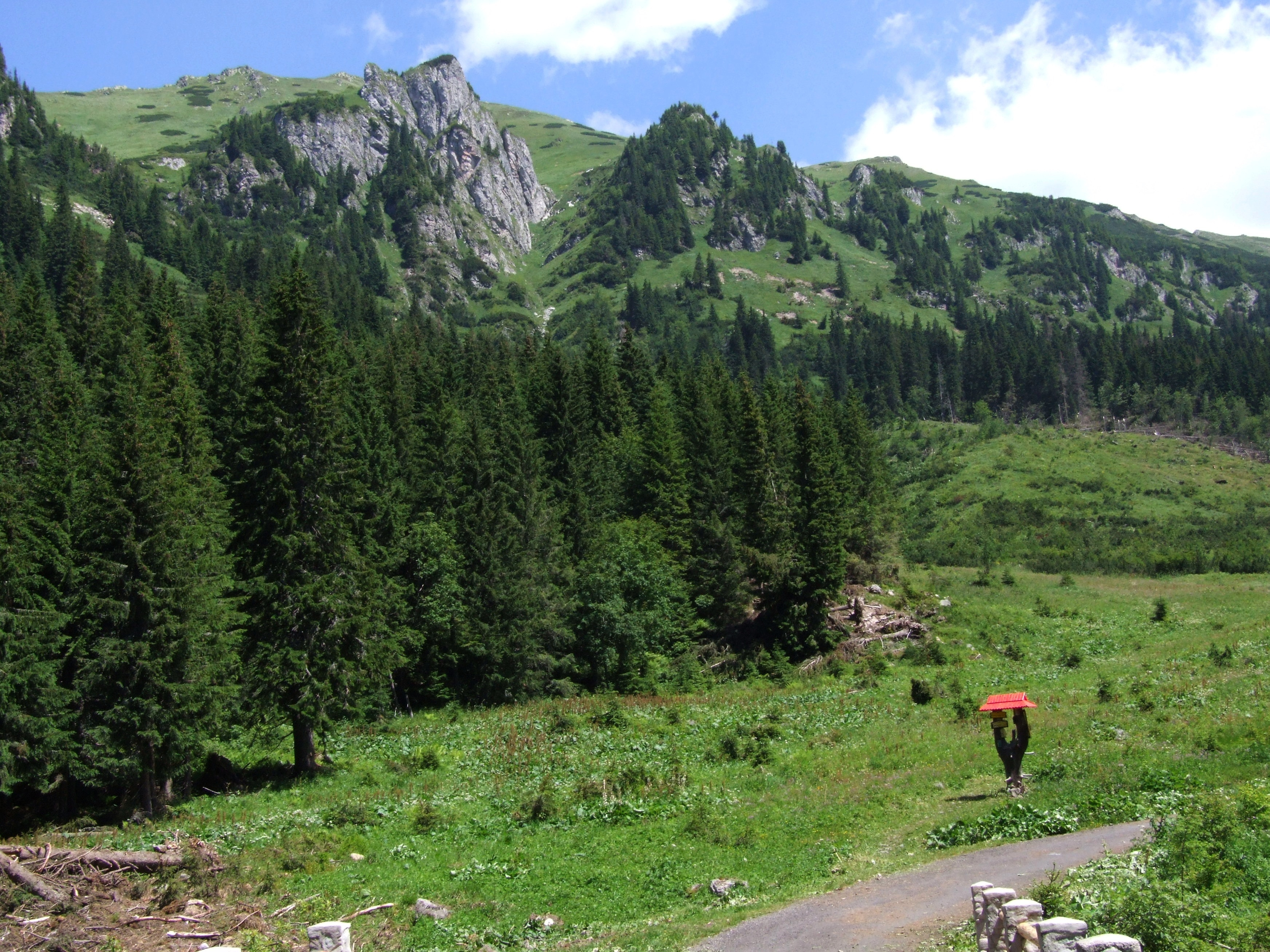 Rozdroże pod Kasprowym. Kasina Turnia i żleb Wrota